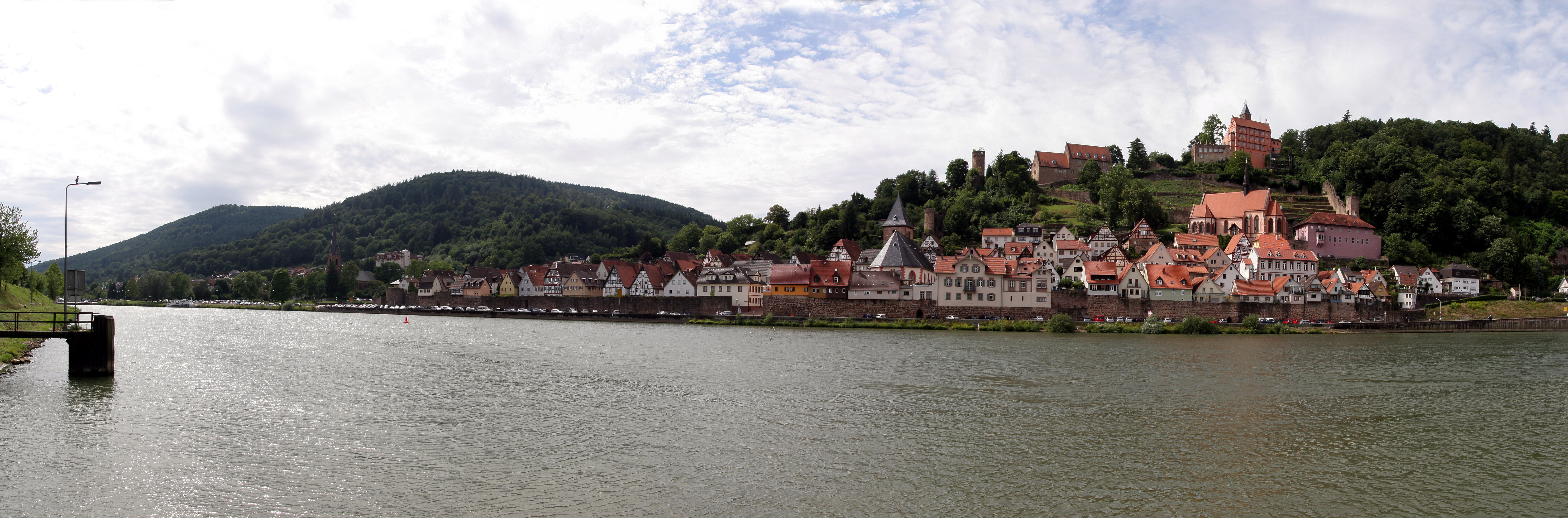 Hirschorn am Neckar. Aufnahme aus drei Einzelbildern zusammengesetzt. f 17mm; 1:5,6; 1/640s.